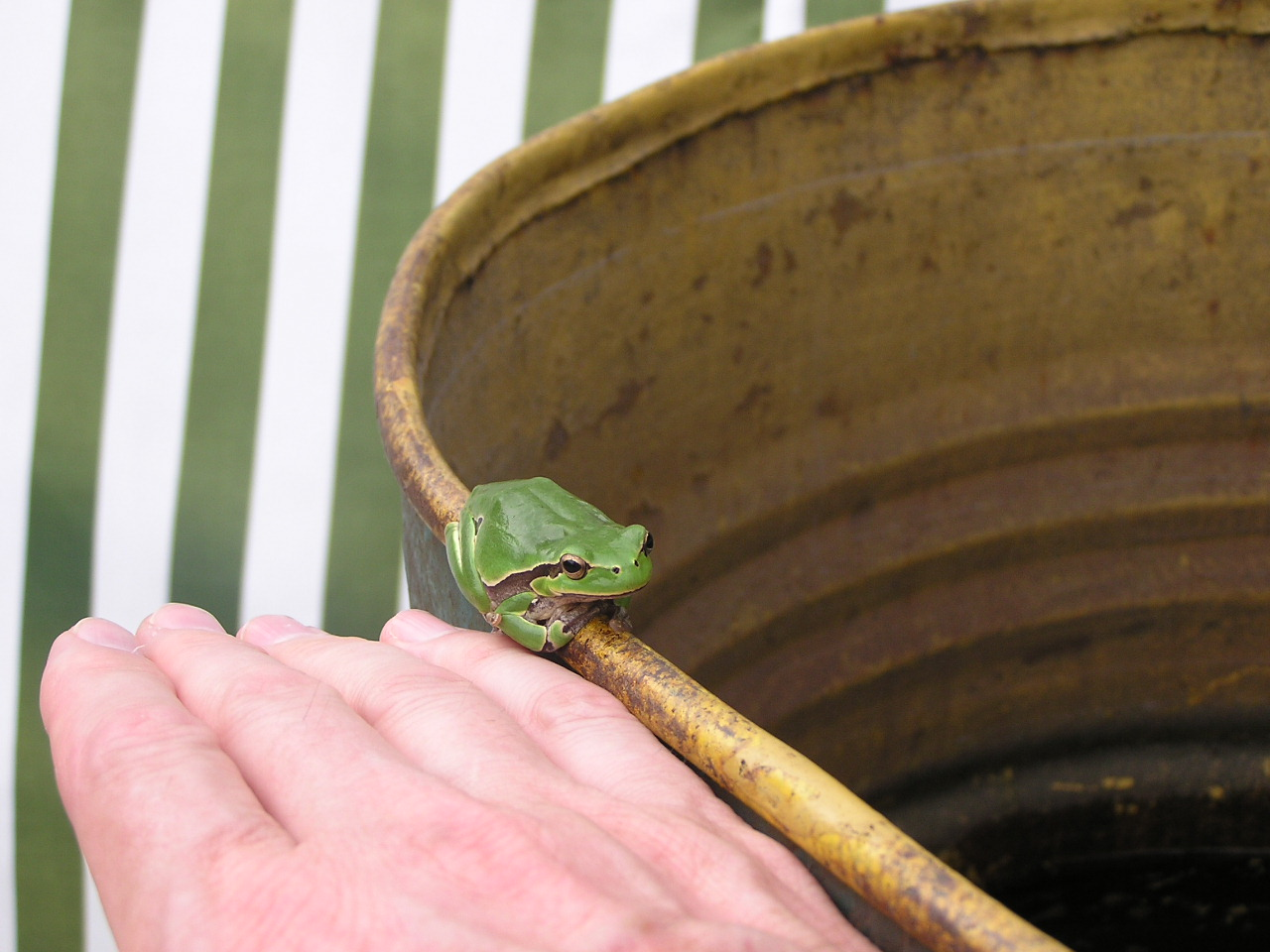 Europäischer Laubfrosch (Hyla arborea)